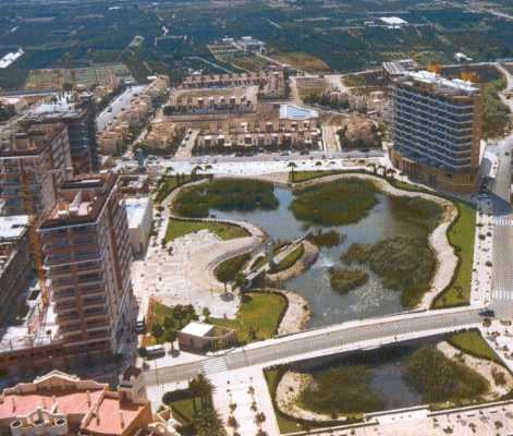 Valencia (Comunidad Valenciana) España. Tavernes de la Valldigna. (provincia de Valencia). La Goleta. Esta imagen cuenta con el consentimiento de la Federación Valenciana de Municipios y Provincias para su difusión.